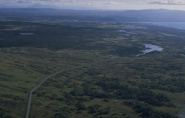 Motiv: Skalstuguvägen Nyckelord: Flygbilder, Riksintressen Kategori: Fjällbygd Skalstuguvägen